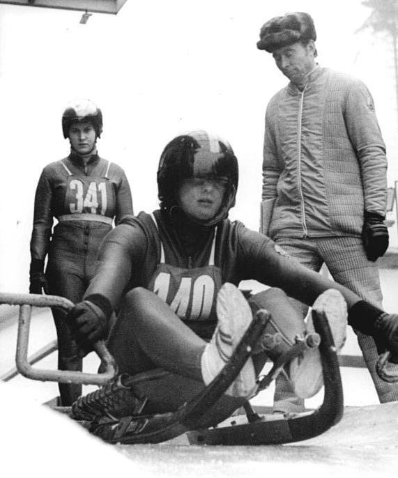 Eva-Maria Wernicke ADN-ZB Schaar 5.1.1975-Bezirk Suhl: DDR-Meisterschaften im Rennschlittensport in Oberhof-Eva-Maria Wernicke vom SC Traktor Oberwiesenthal liegt nach drei Läufen klar in Führung.